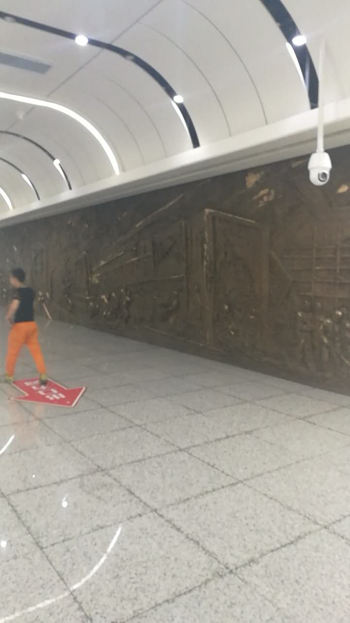 长春地铁胜利公园站壁画